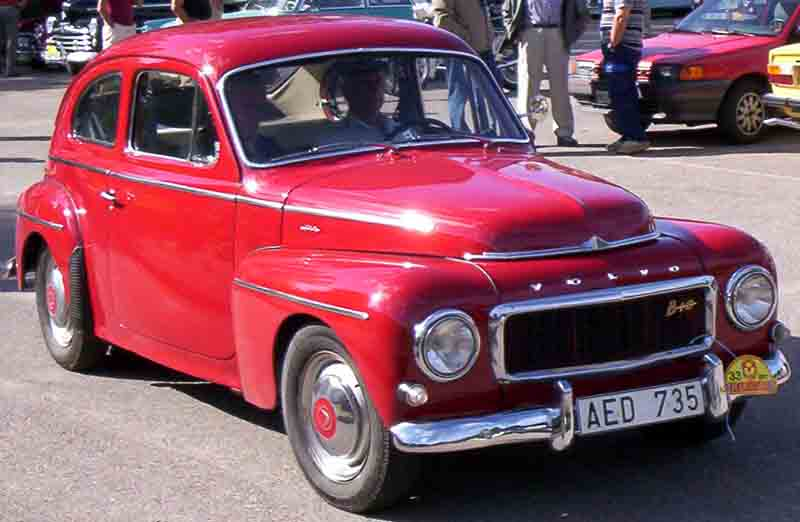 1964 Volvo PV544